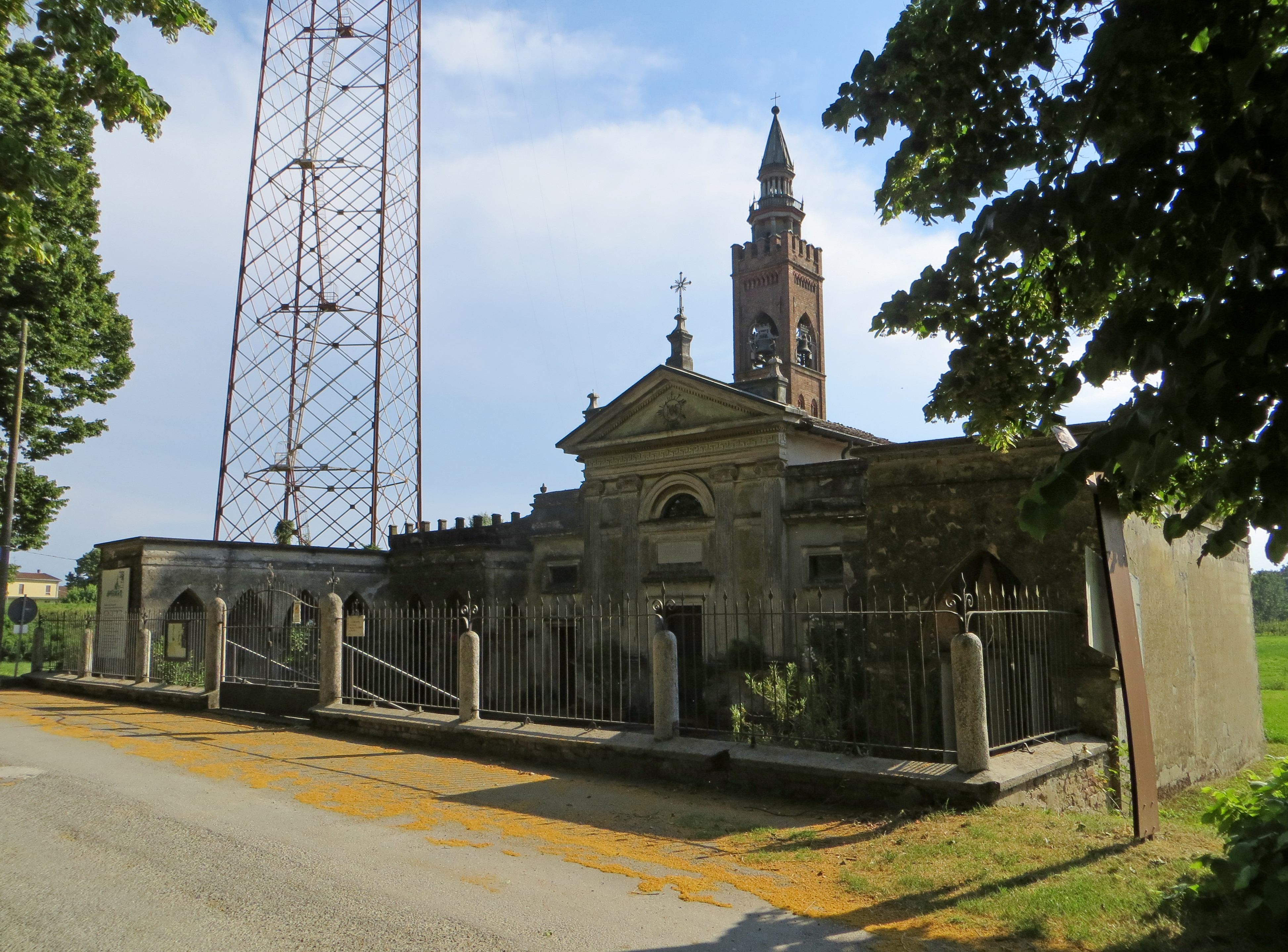 Chiesa della Beata Vergine di Loreto (Polesine Parmense) - facciata